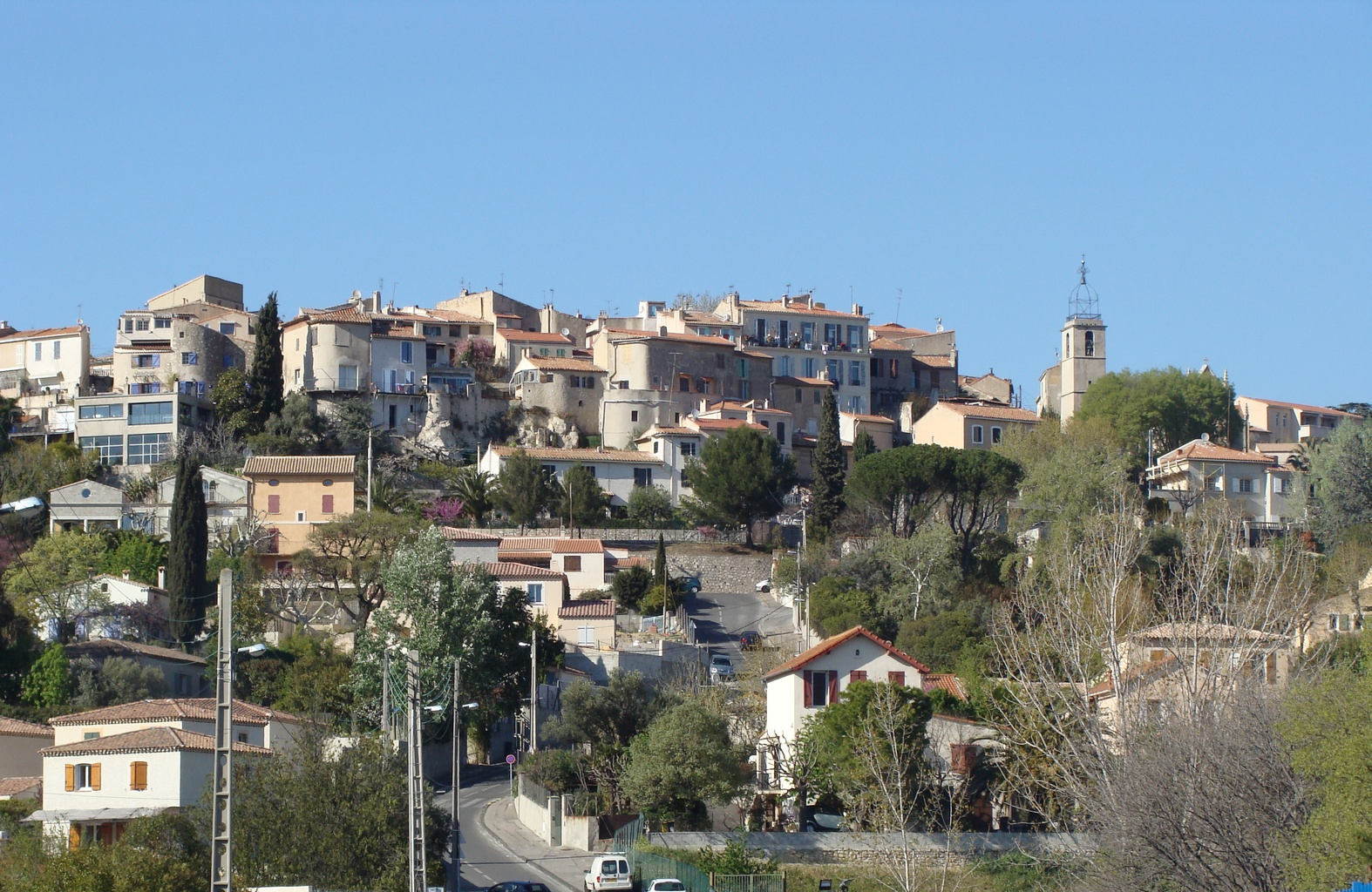 Le village de Saint-Julien sur sa colline, vu depuis les Caillols.